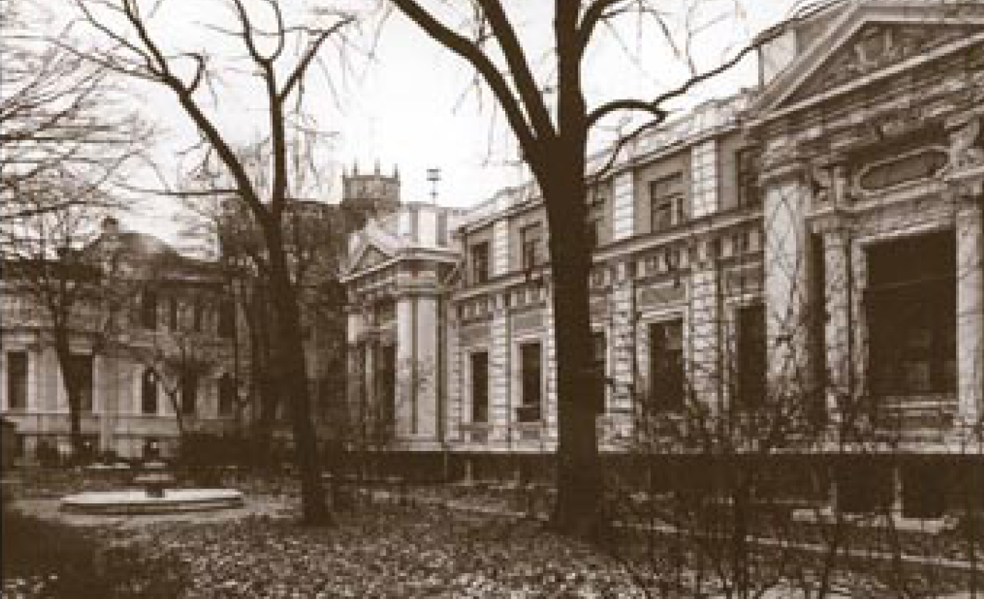 Особняк Варвары Морозовой на улице Воздвиженка, д. 14, архитектор Р. И. Клейн